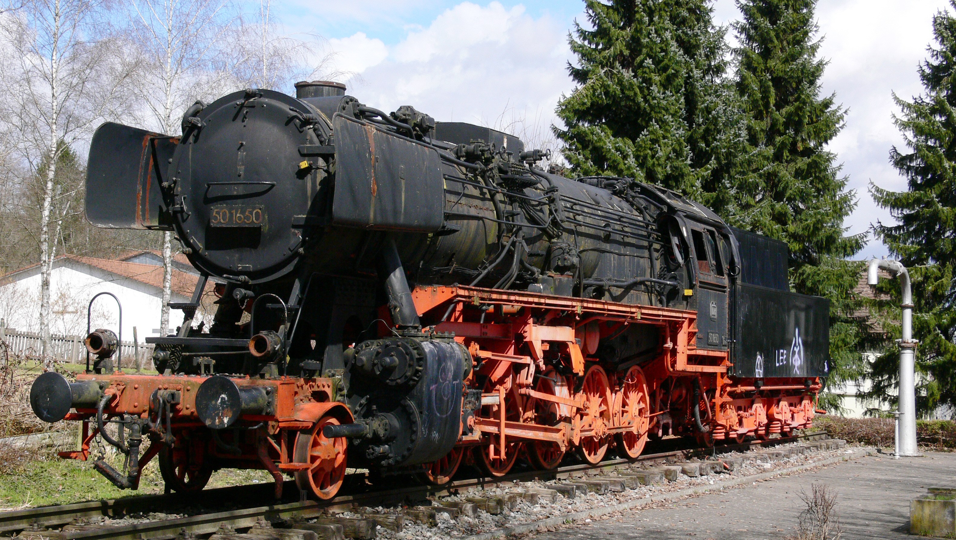 Aulendorf: Lok 50 1650 (ausgestellt gegenüber dem Bahnhof), Daten siehe z. B. hier